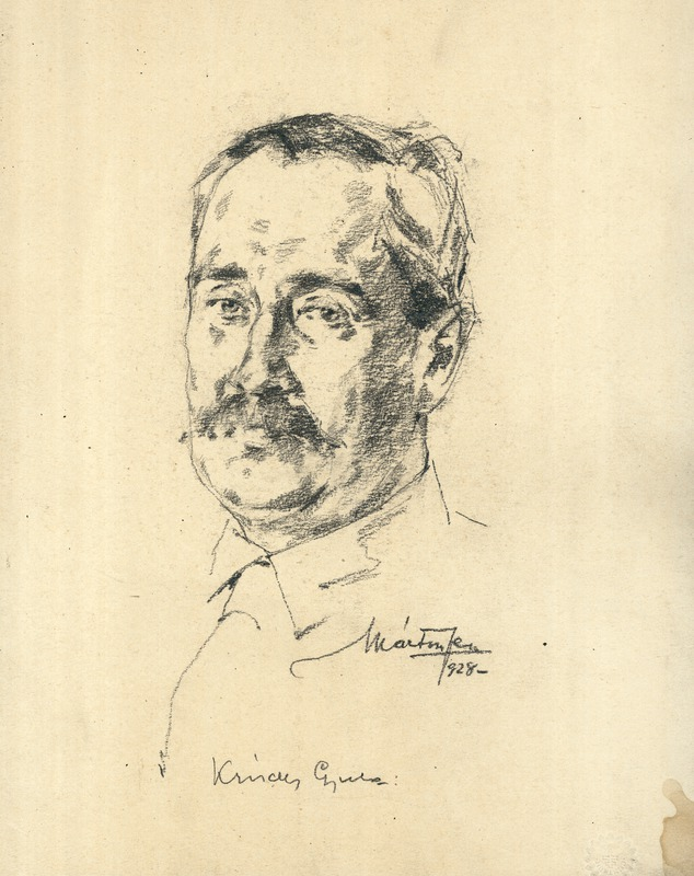 Márton Ferenc Krúdy Gyula portréja (A grafikát a Petőfi Irodalmi Múzeum publikálta 2014-ben)